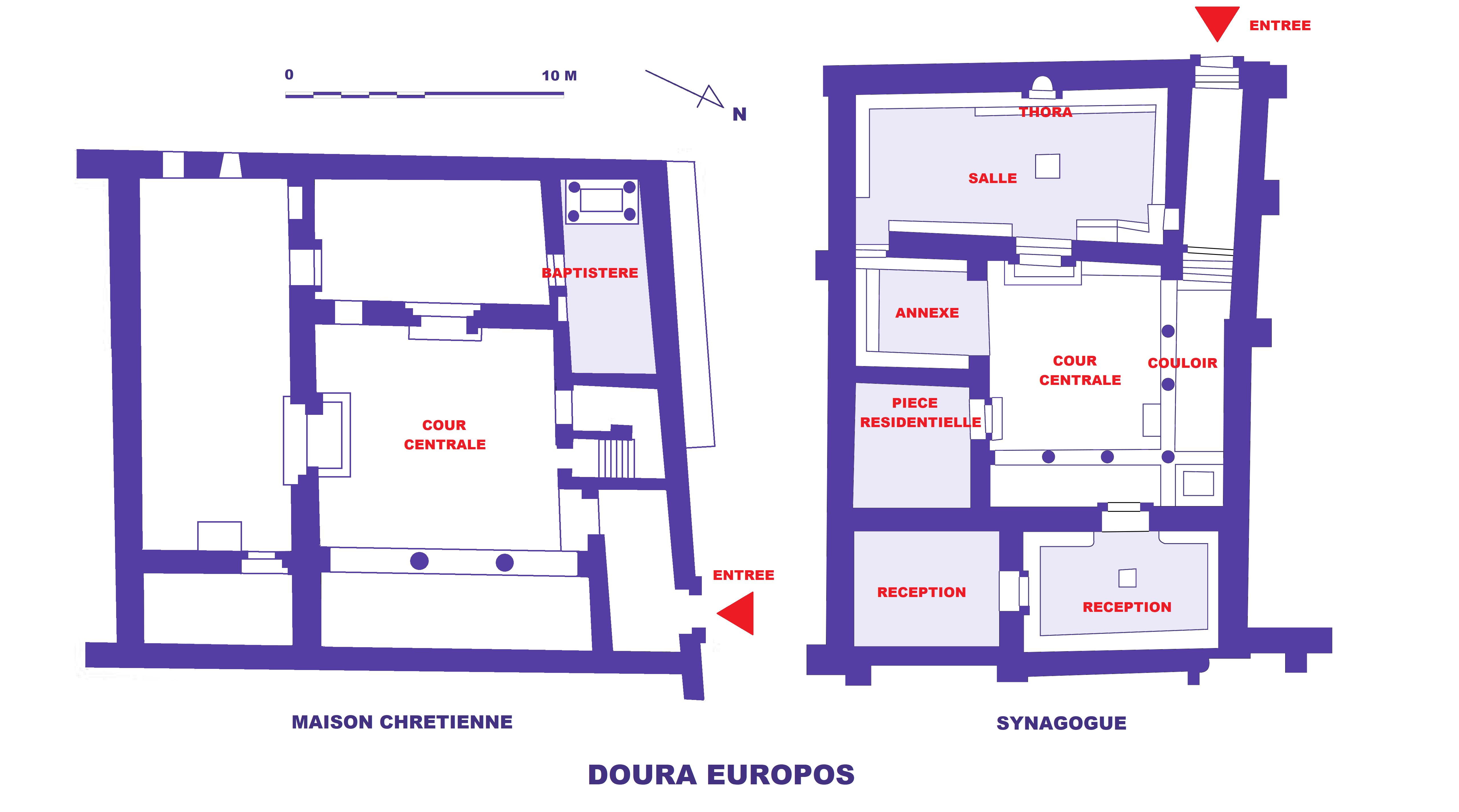 Doura Europos, plans de la maison chrétienne et de la synagogue (images commons modifiées)